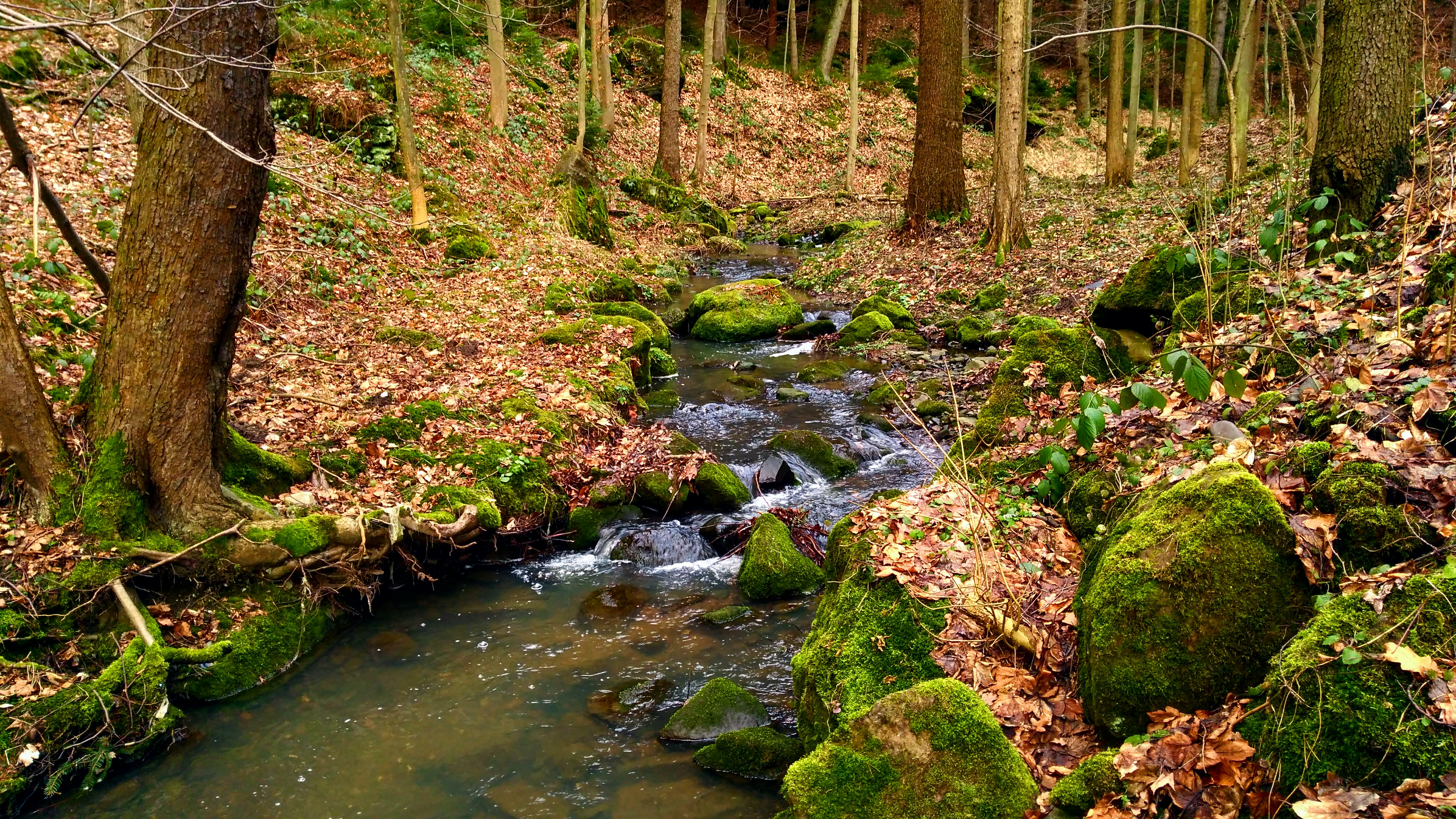 Potok.